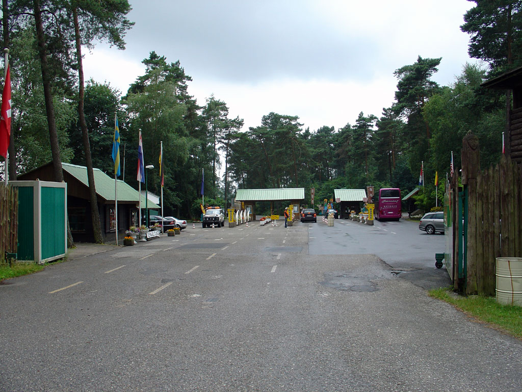 Einfahrt zum Hollywood Safaripark in Stukenbrock